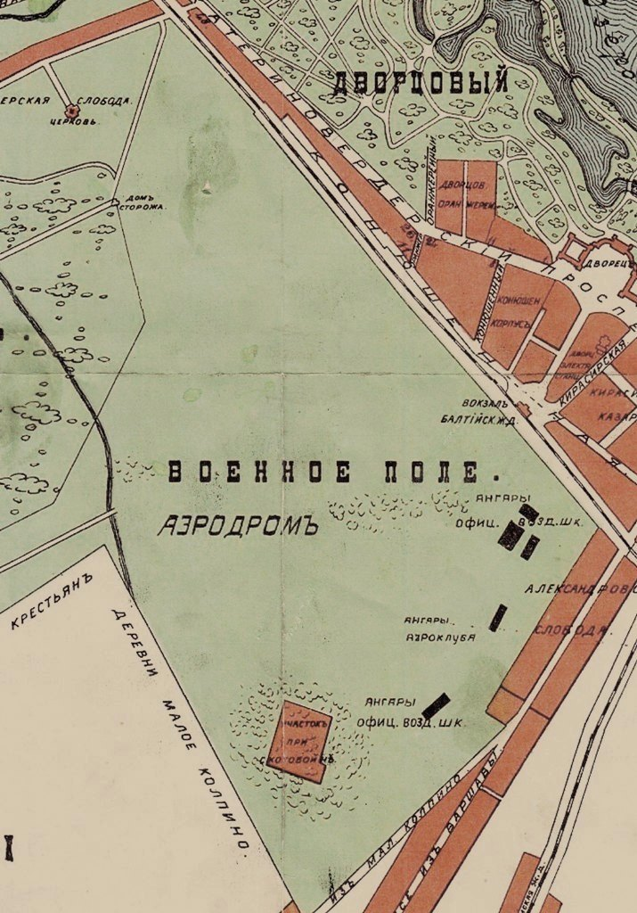 План аэродрома на Военном поле в Гатчине, Россия, 2010